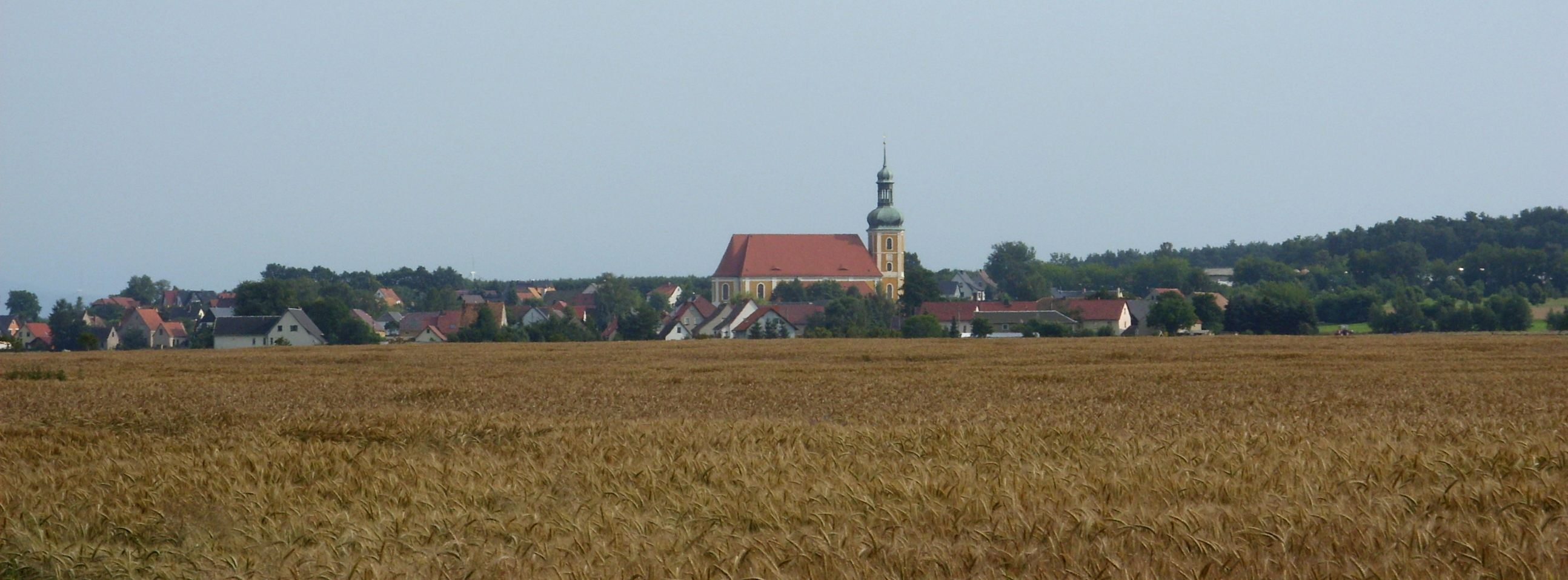 Blick von Laske nach Rosenthal, Landkreis Bautzen. Hornjoserbsce: Wid do Róžanta wot Łaska sem.